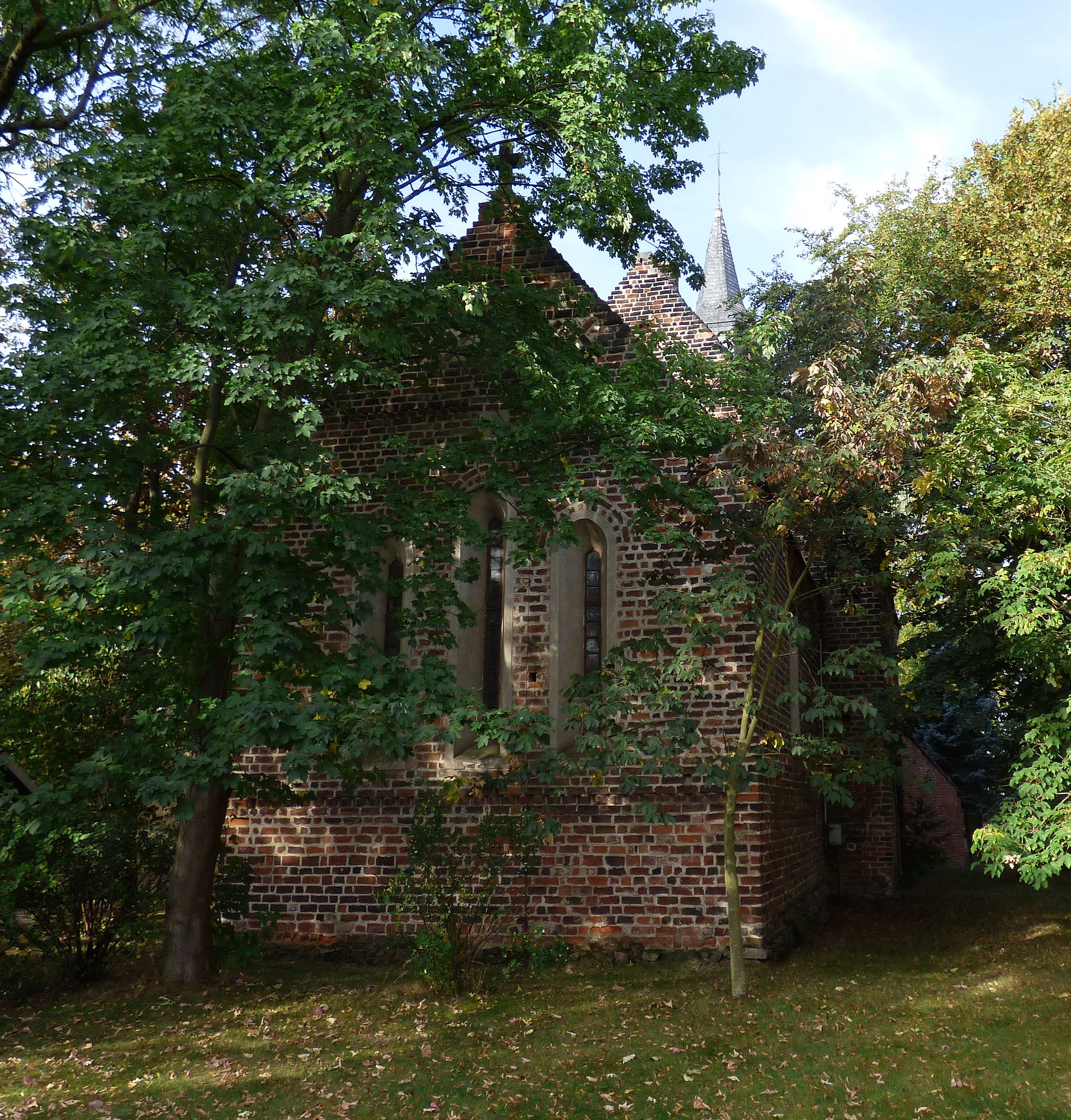 Dorfkirche Burxdorf